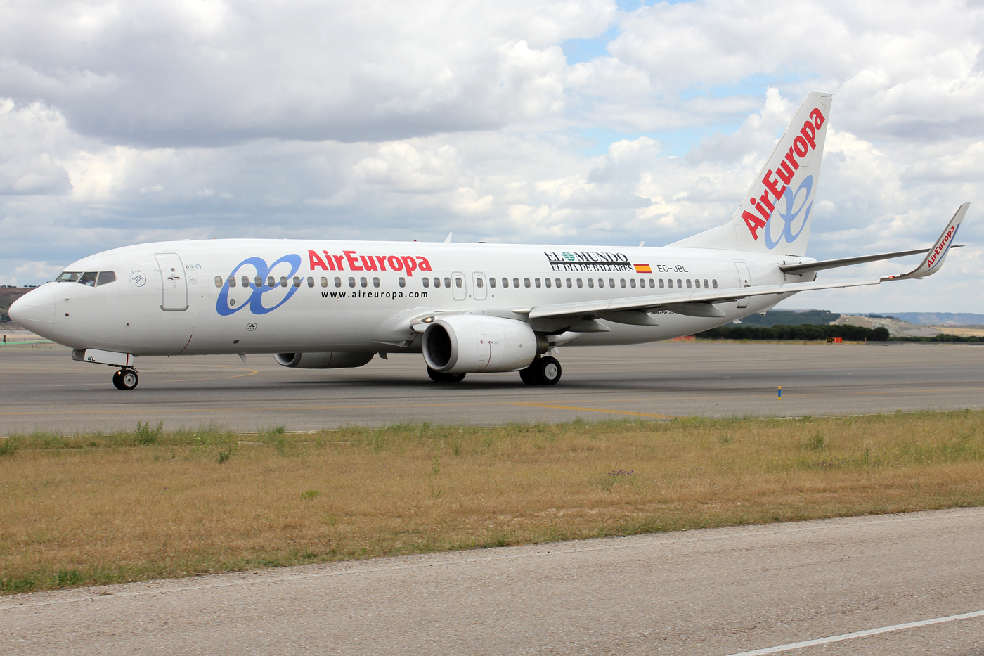 Air Europa Boeing 737-800